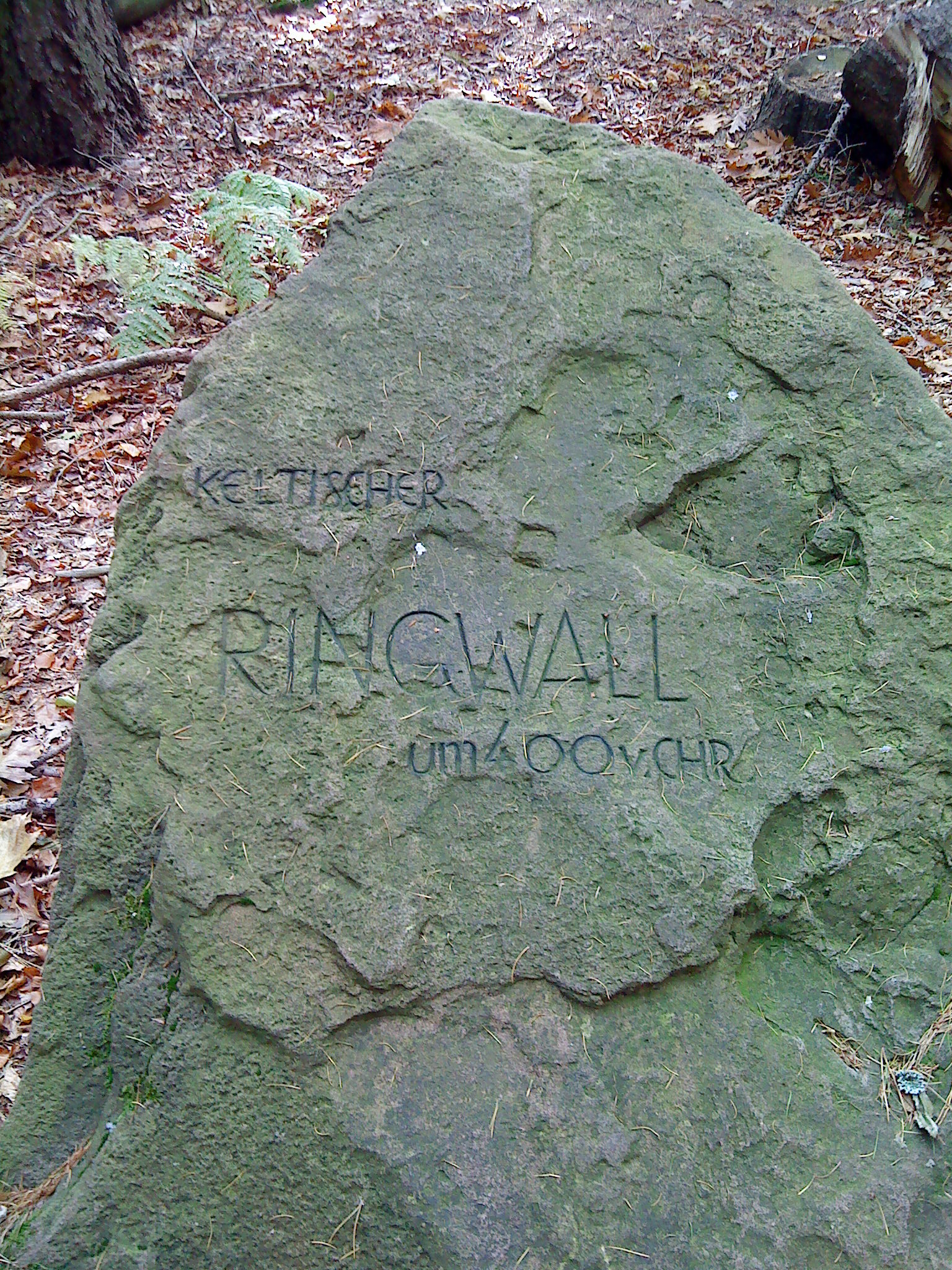 Der Hinweisstein eines vermutlichen Keltenwalles auf dem Gipfel des Reuschberges bei Schöllkrippen